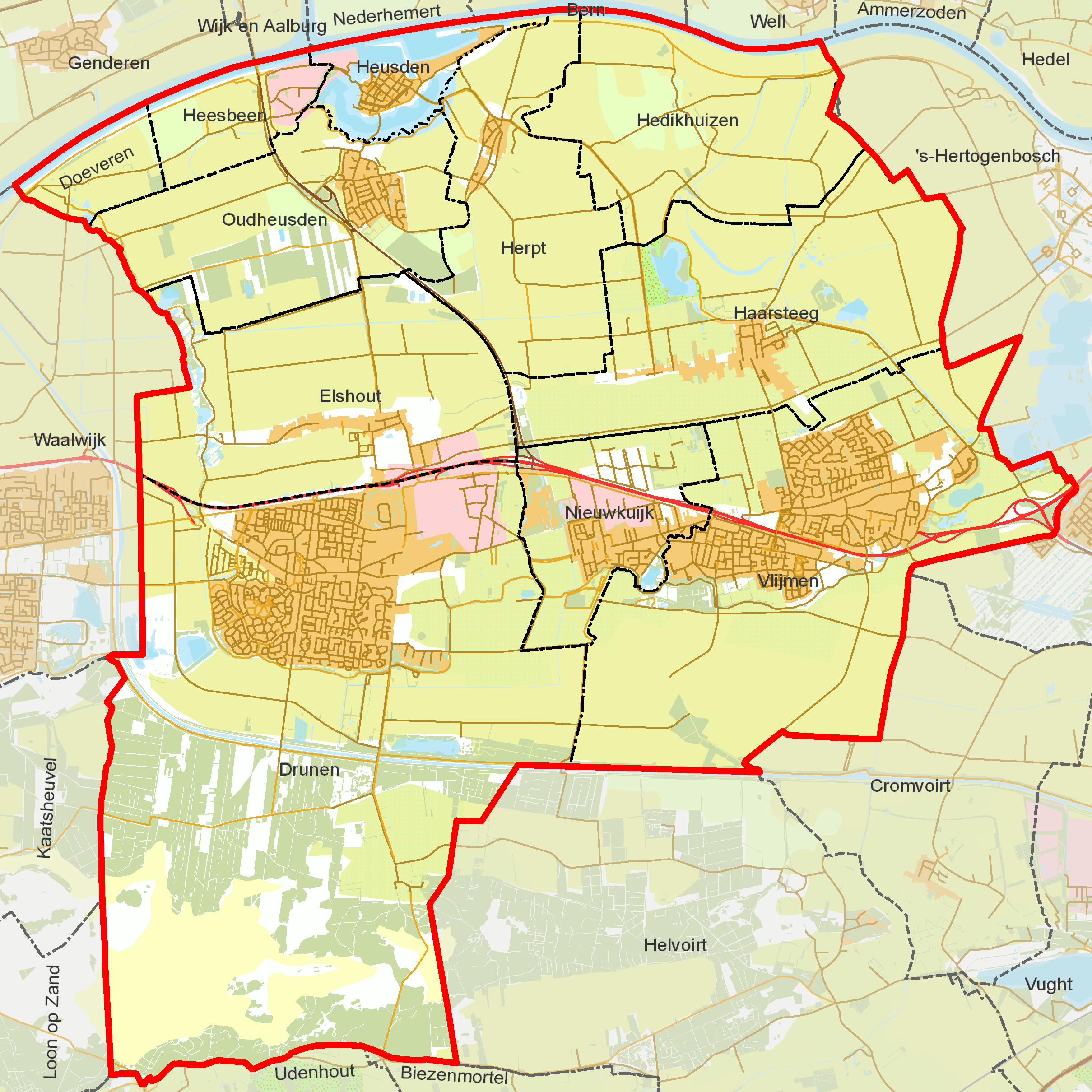 BAG woonplaatsen - Gemeente Heusden.png